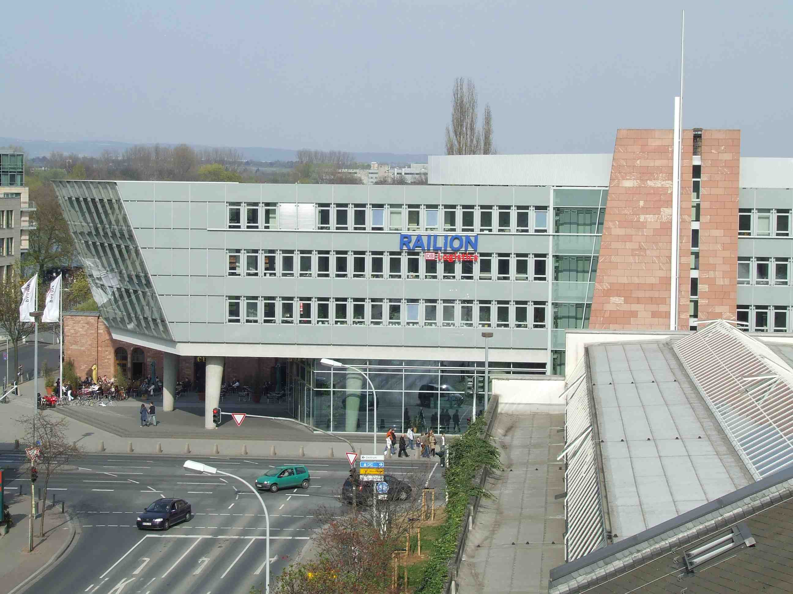 Railion Deutschland Hauptzentrale in Mainz